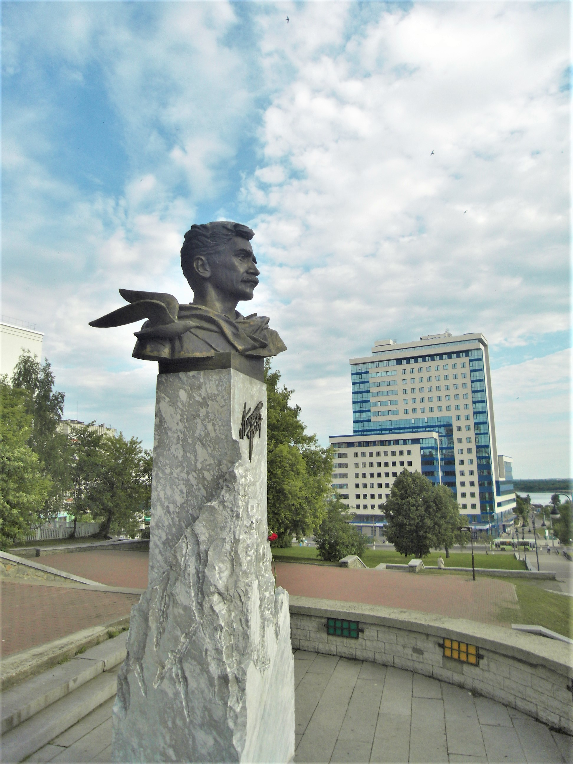 Памятник Александру Степановичу Грину на набережной Грина в г. Киров, 2000 г.